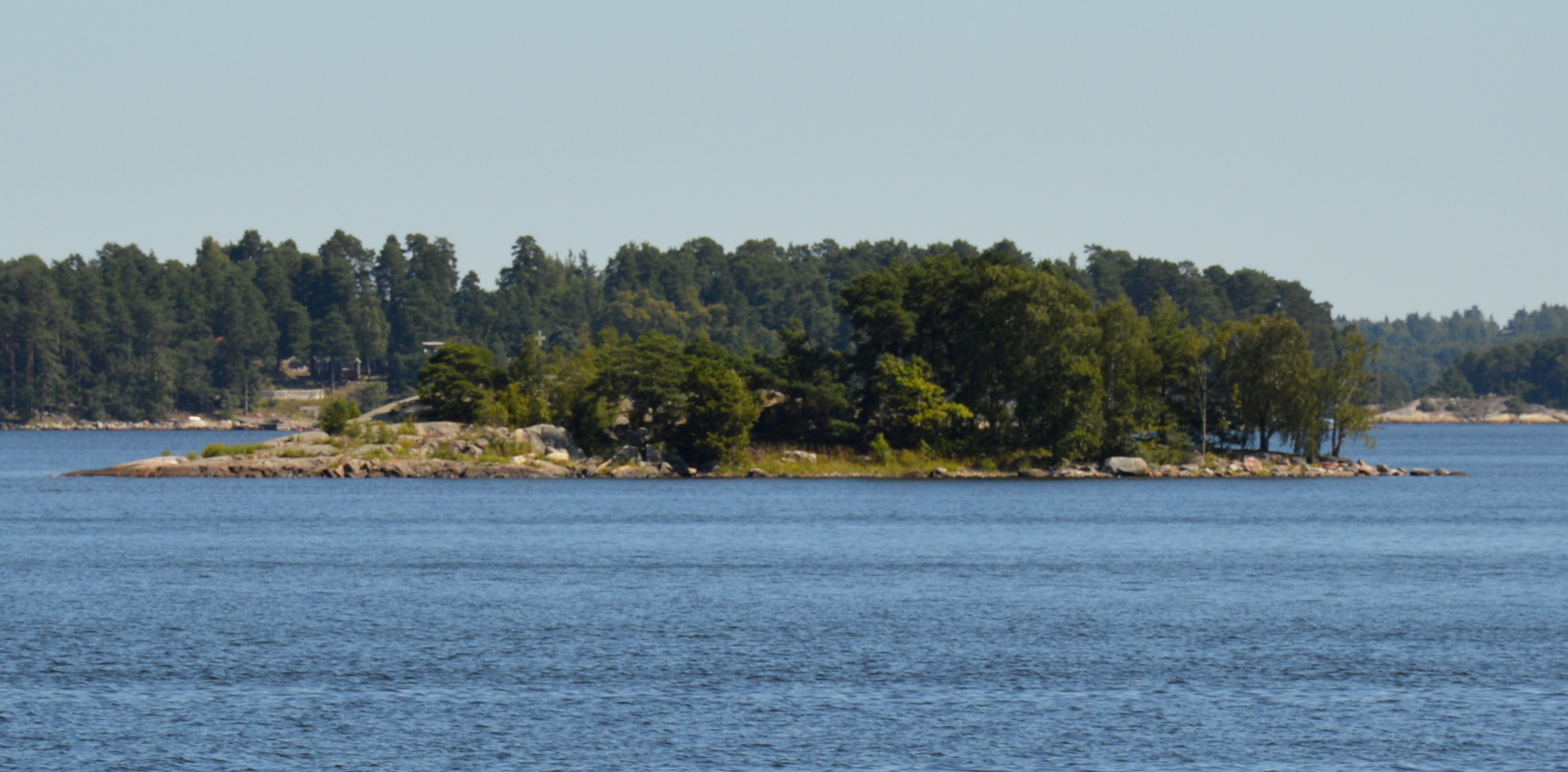 Insel Lördan